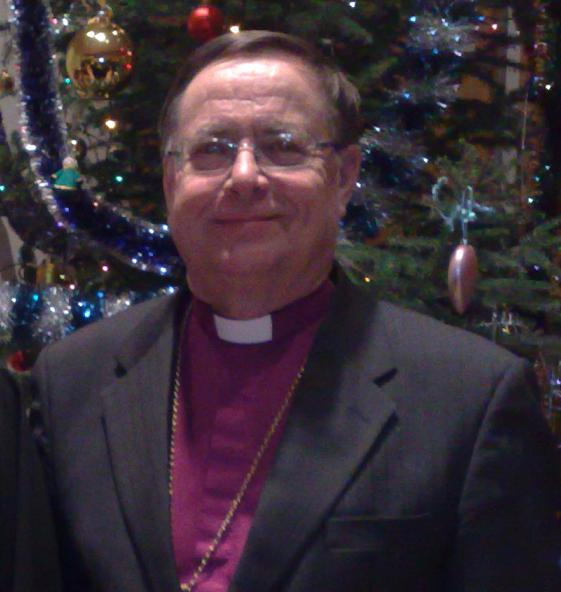 Юкка Паарма, архиепископ Турку